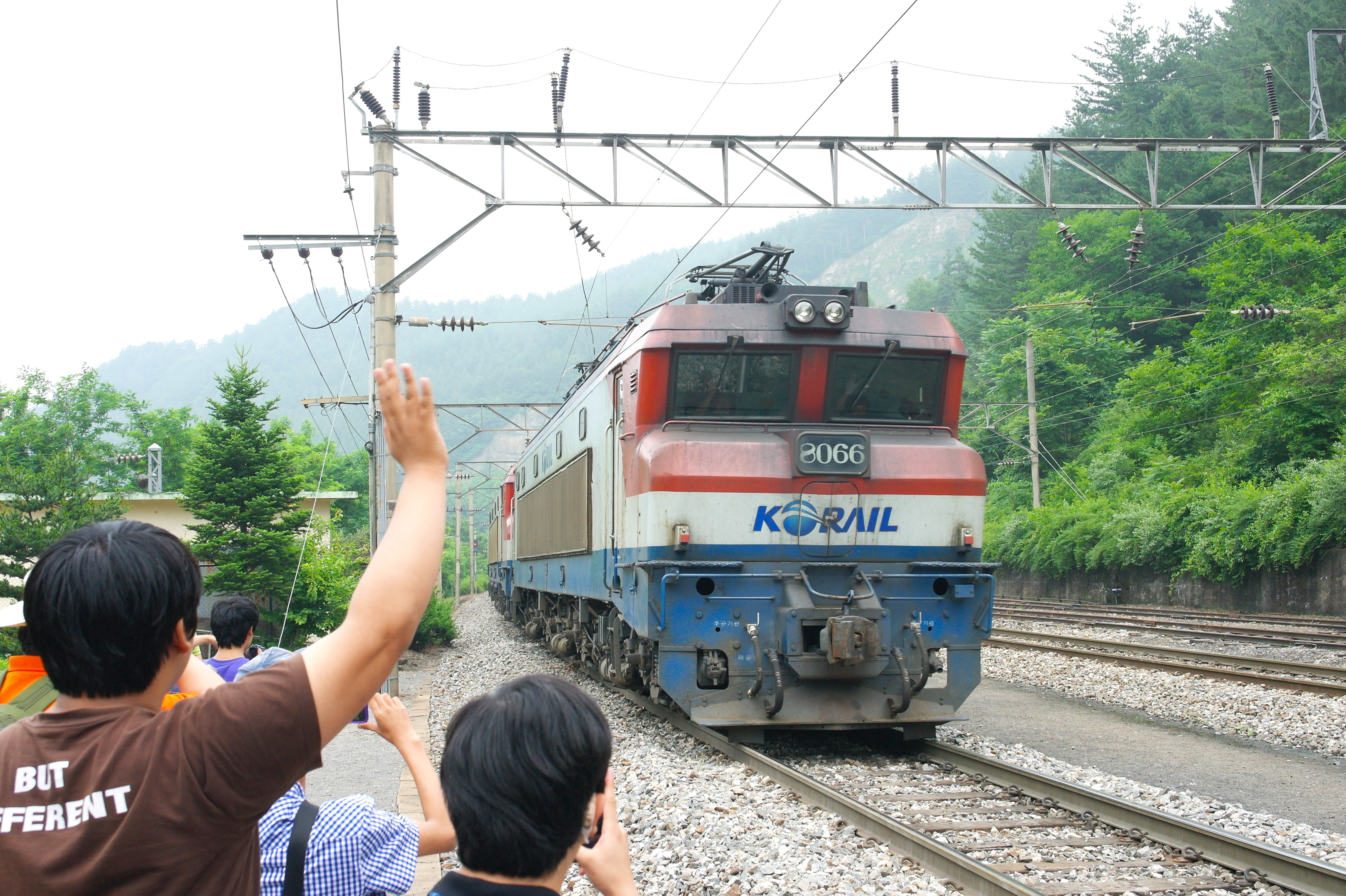 Korea rail mania